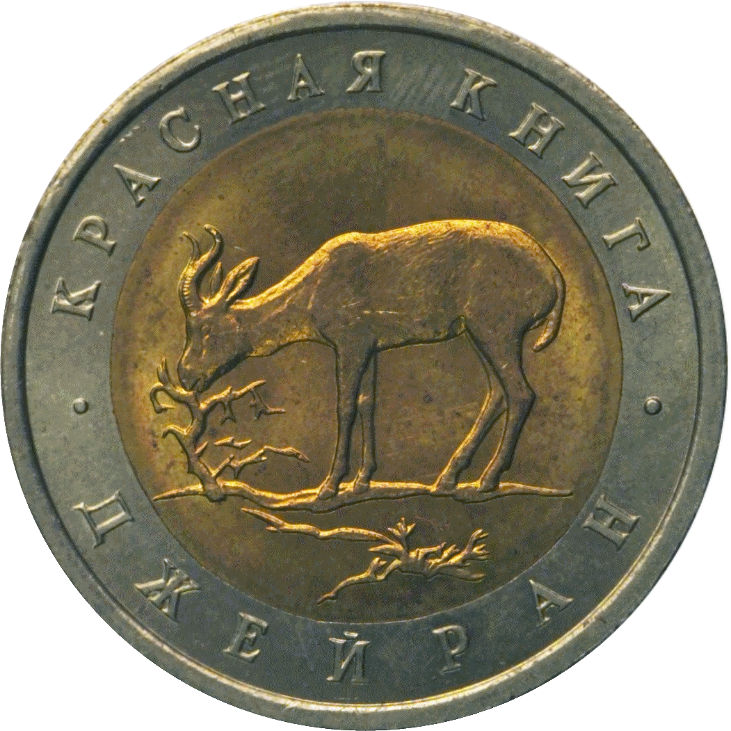 Монета Банка России — Серия: «Красная книга», Джейран, 50 рублей, реверс.